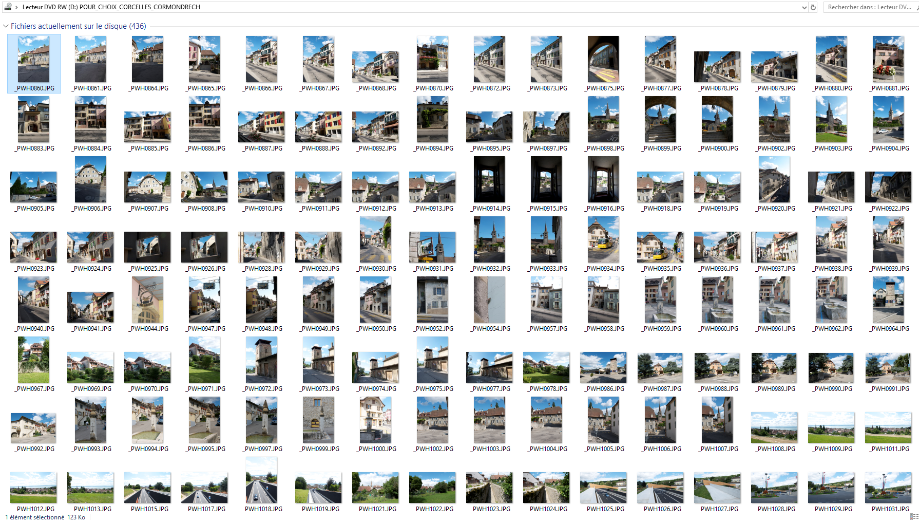 Capture d'écran du contenu d'un disque CD-R avec des vignettes de photographies